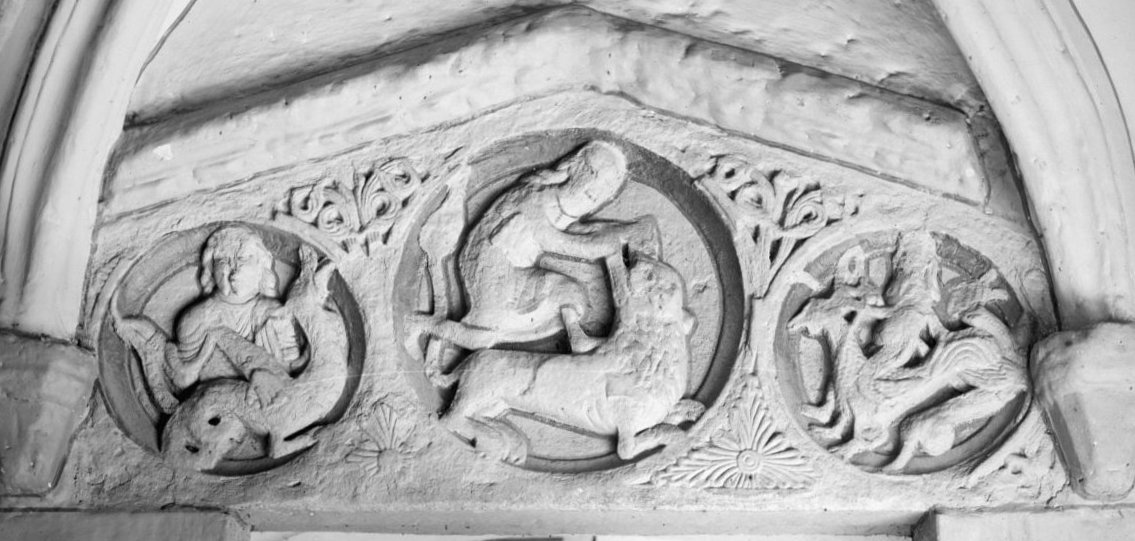 Rooms-Katholieke Kerk: Toren, Latei